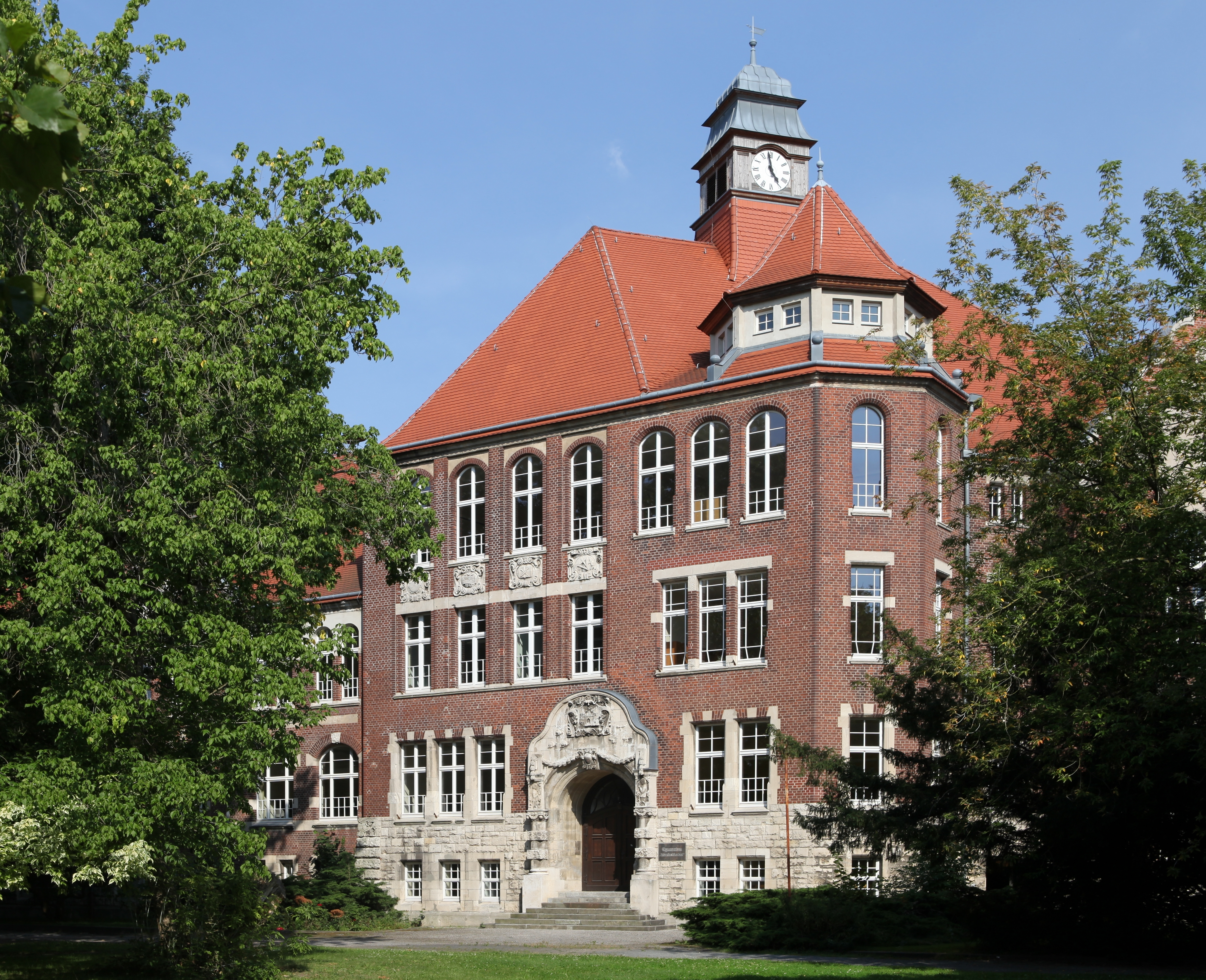 Kulturdenkmal Ehemaliges Realgymnasium Dr.-Külz-Ring 9 in Eilenburg; Objektnummer: 08973325